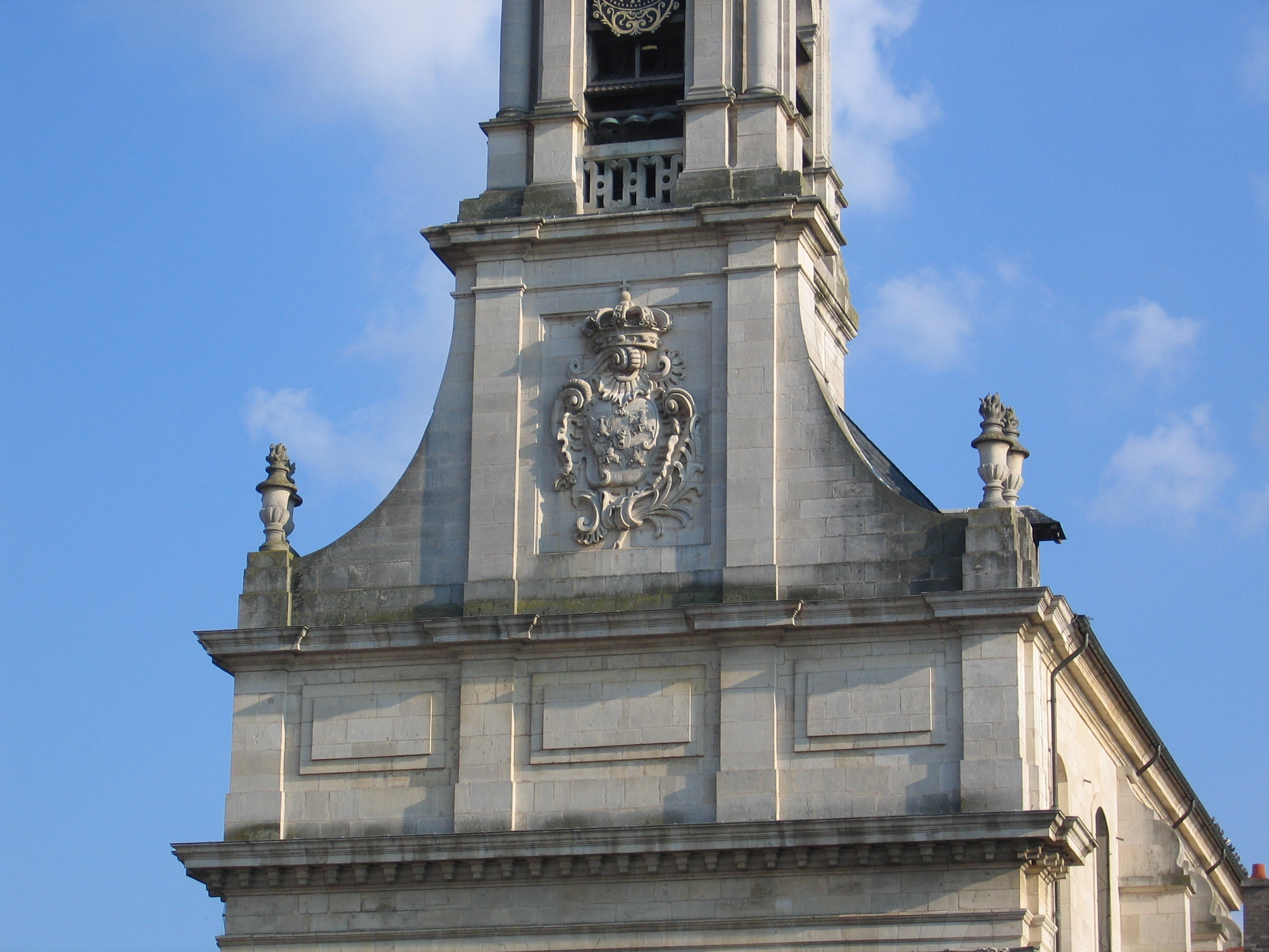 Armoiries de Stanislas Leszczyński, église Notre-Dame de Bonsecours, Nancy, Lorraine